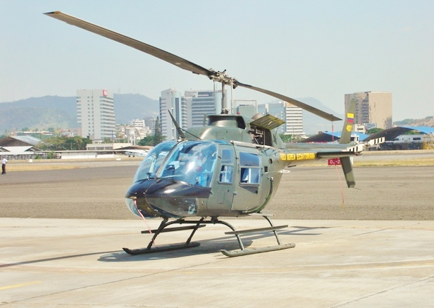 Helicoptero TH 57